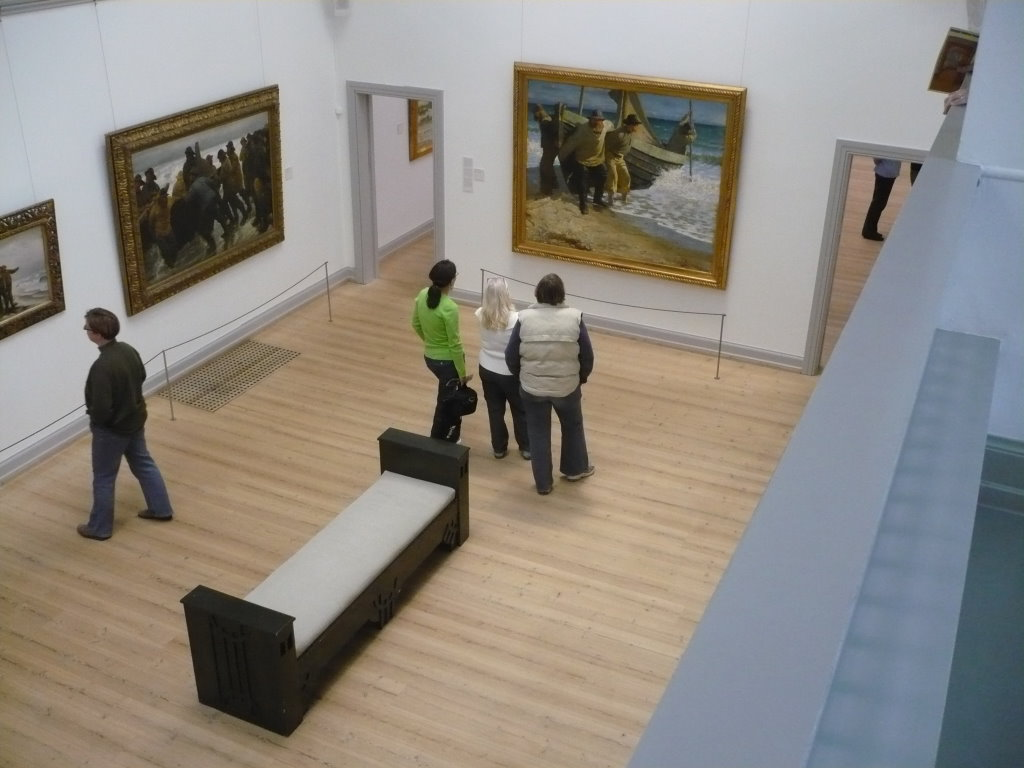 Michael Ancher paintings in Skagens Museum in Skagen, Denmark